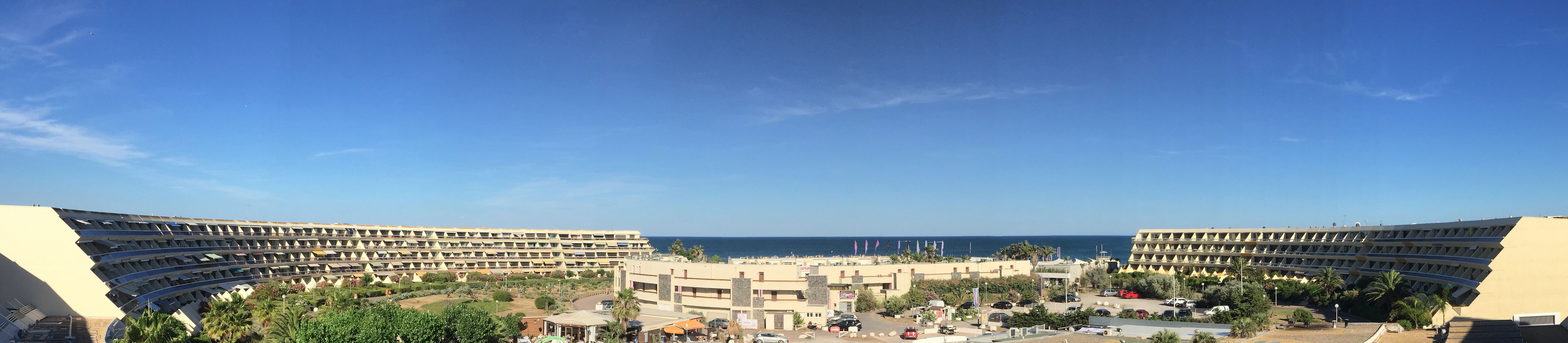 Panorámakép a Héliopolis H épületéből (előtérben a Jardain d'Eden épülete), Cap d’Agde, Franciaország